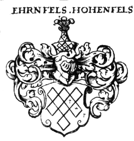 Wappen des Adelsgeschlechts der Freiherren von Hohenfels (”Ehrnfels. Hohenfels.“)